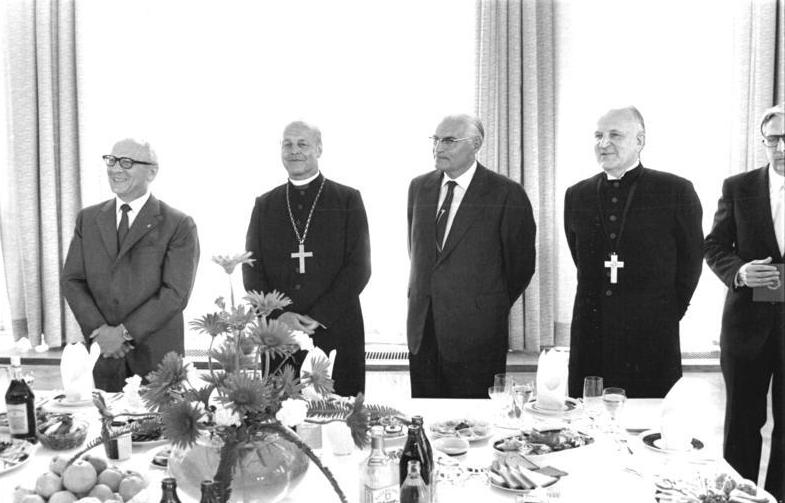 ADN-ZB-Schneider-13.6.80 Berlin: Martin-Luther-Komitee Eine konstituierende Sitzung des Martin-Luther-Komitees der DDR fand im Amtssitz des Staatsrates statt. v.l.n.r.: Erich Honecker, Landesbischof Werner Leich, Gerald Götting, Bischof Werner Krusche